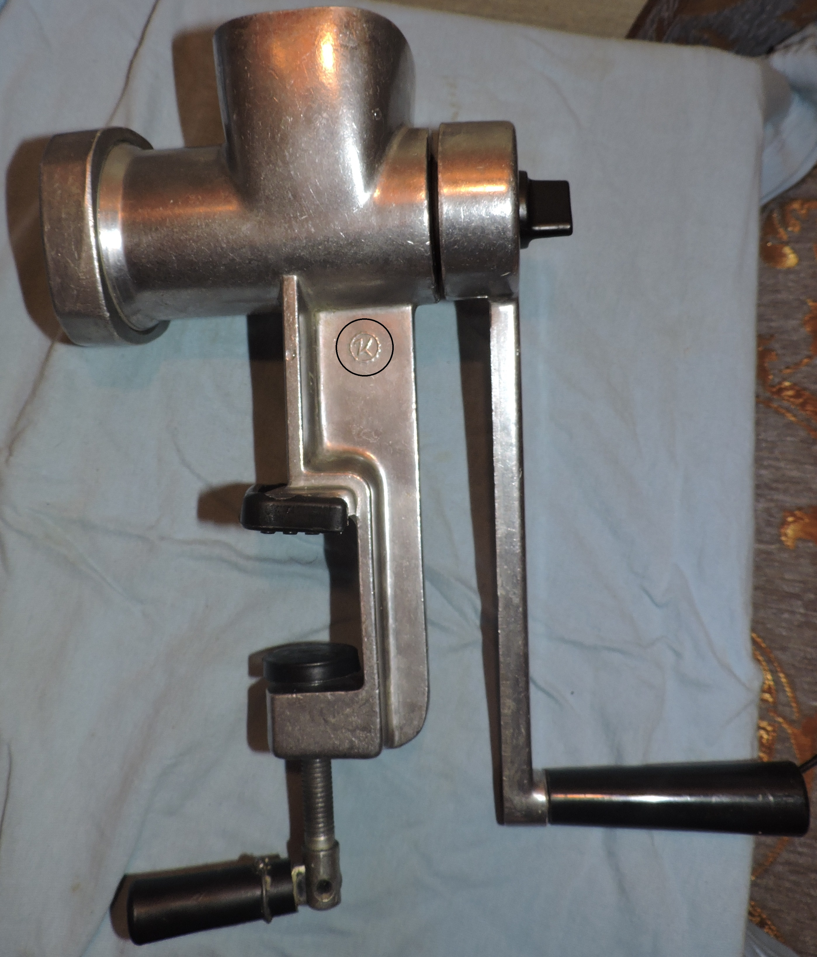 Ручная мясорубка в собранном состоянии